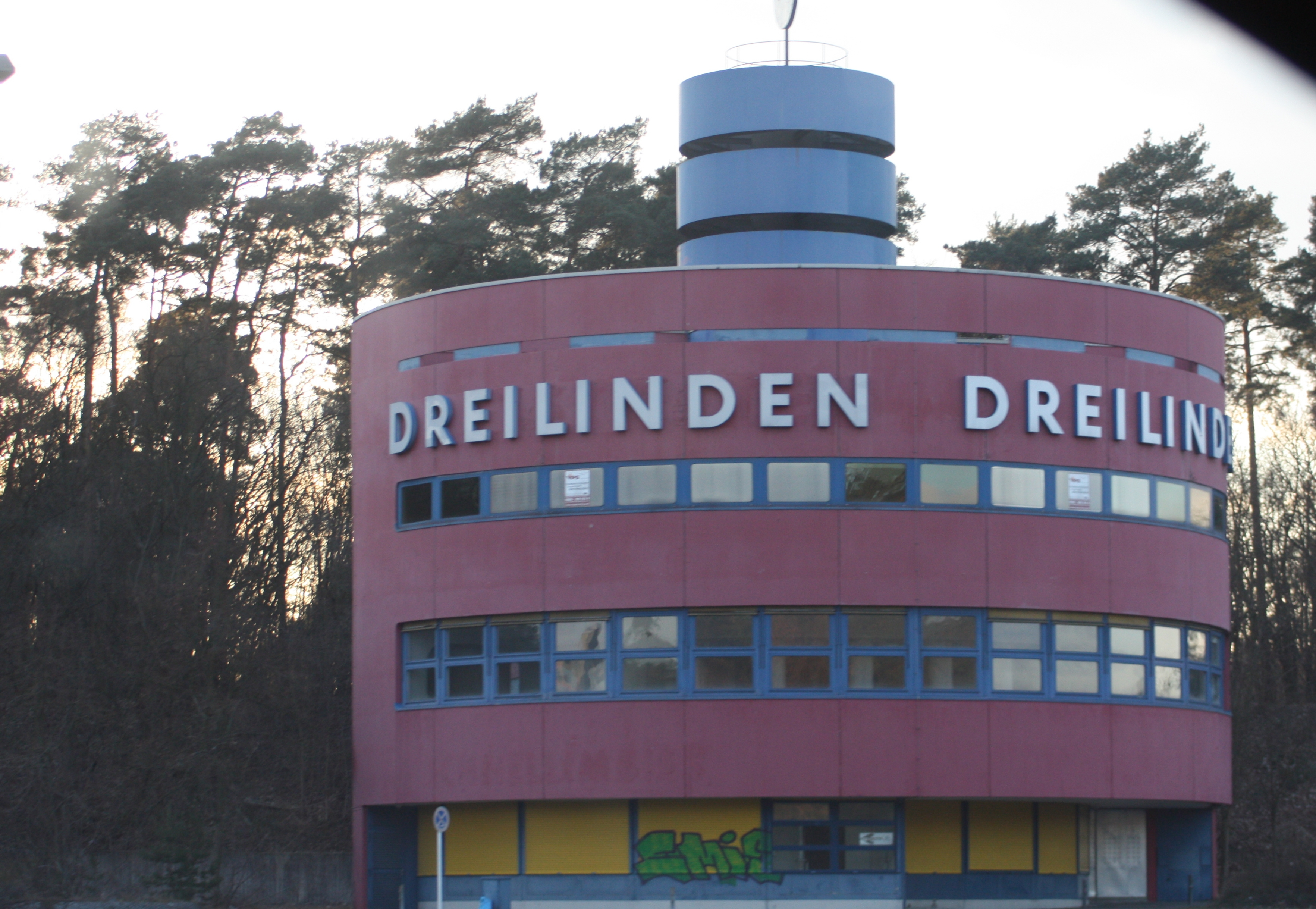 Checkpoint Drewitz-Dreilinden, 2009